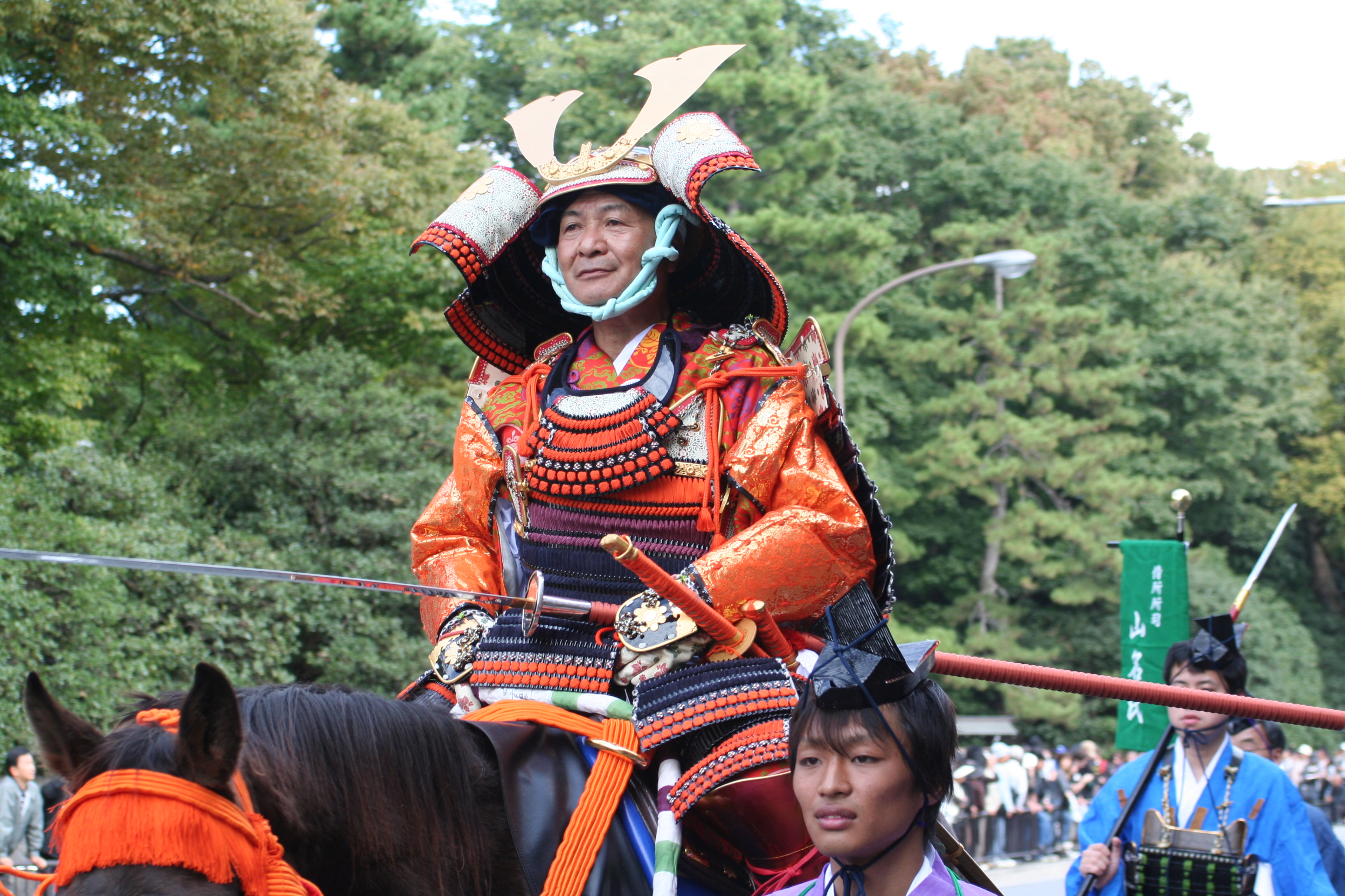 京都府京都市にて開催された時代祭。正午の御所から平安神宮までの行進の様子。2009年10月22日撮影。